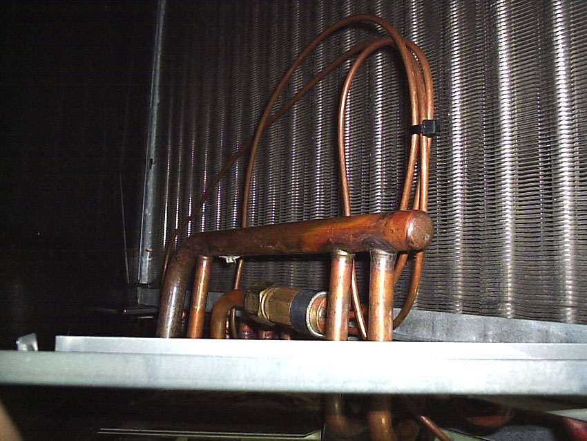 Evaporador aleteado al interior de unidad Split de ductos.